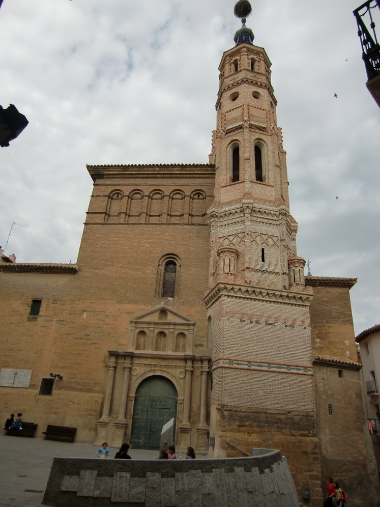 Albalate del Arzobispo. Bajo Martín. Aragón. Iglesia de la Asunción, s. XVI; torre, probable alminar s. XI.